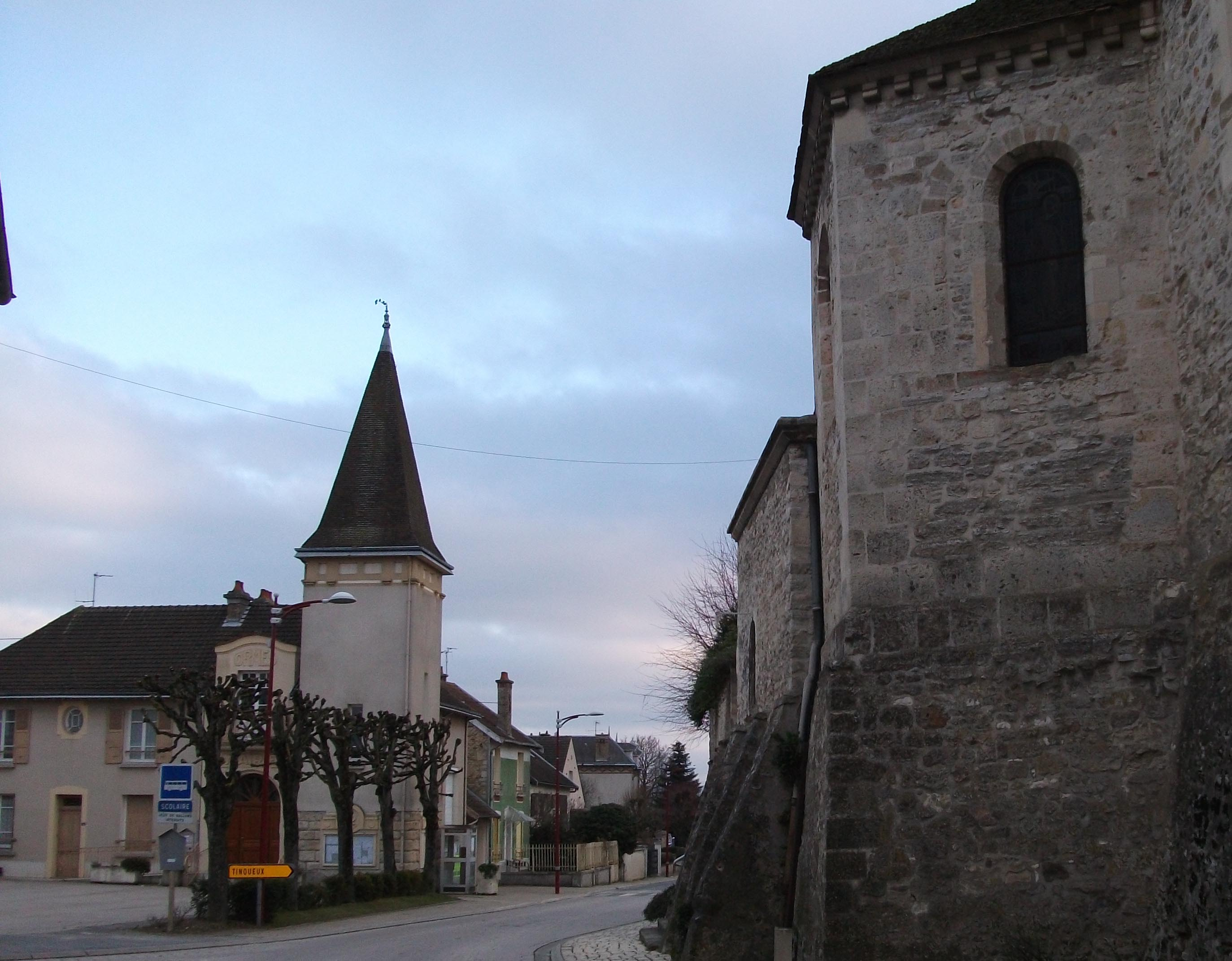 l'église_d'Ormes (droite), la mairie et la place de la mairie.